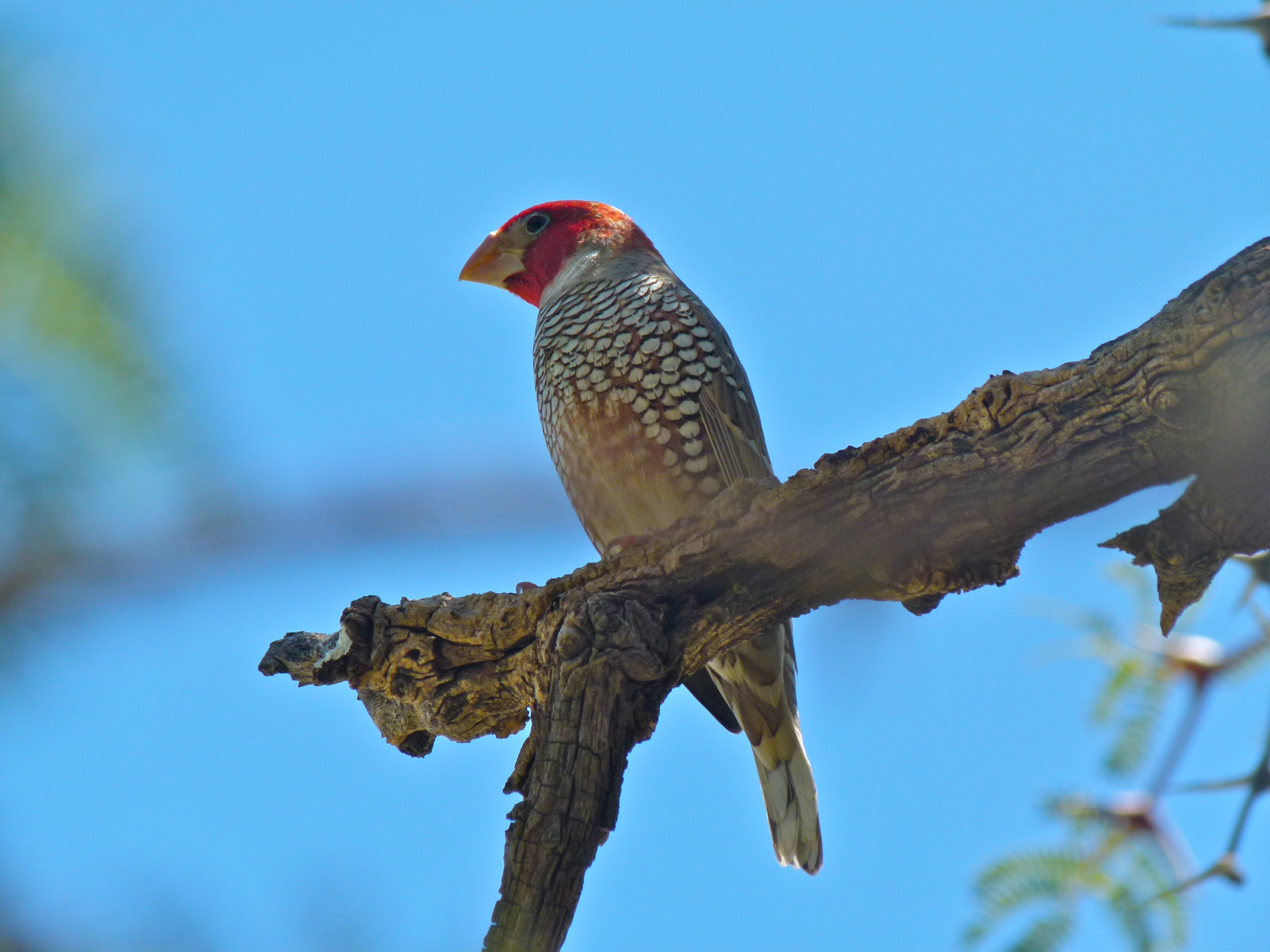 Grootkolk Camp, Kgalagadi Transfrontier Park, SOUTH AFRICA